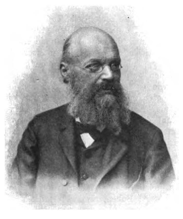 Eugen von Lommel (1837-1899), German physicist